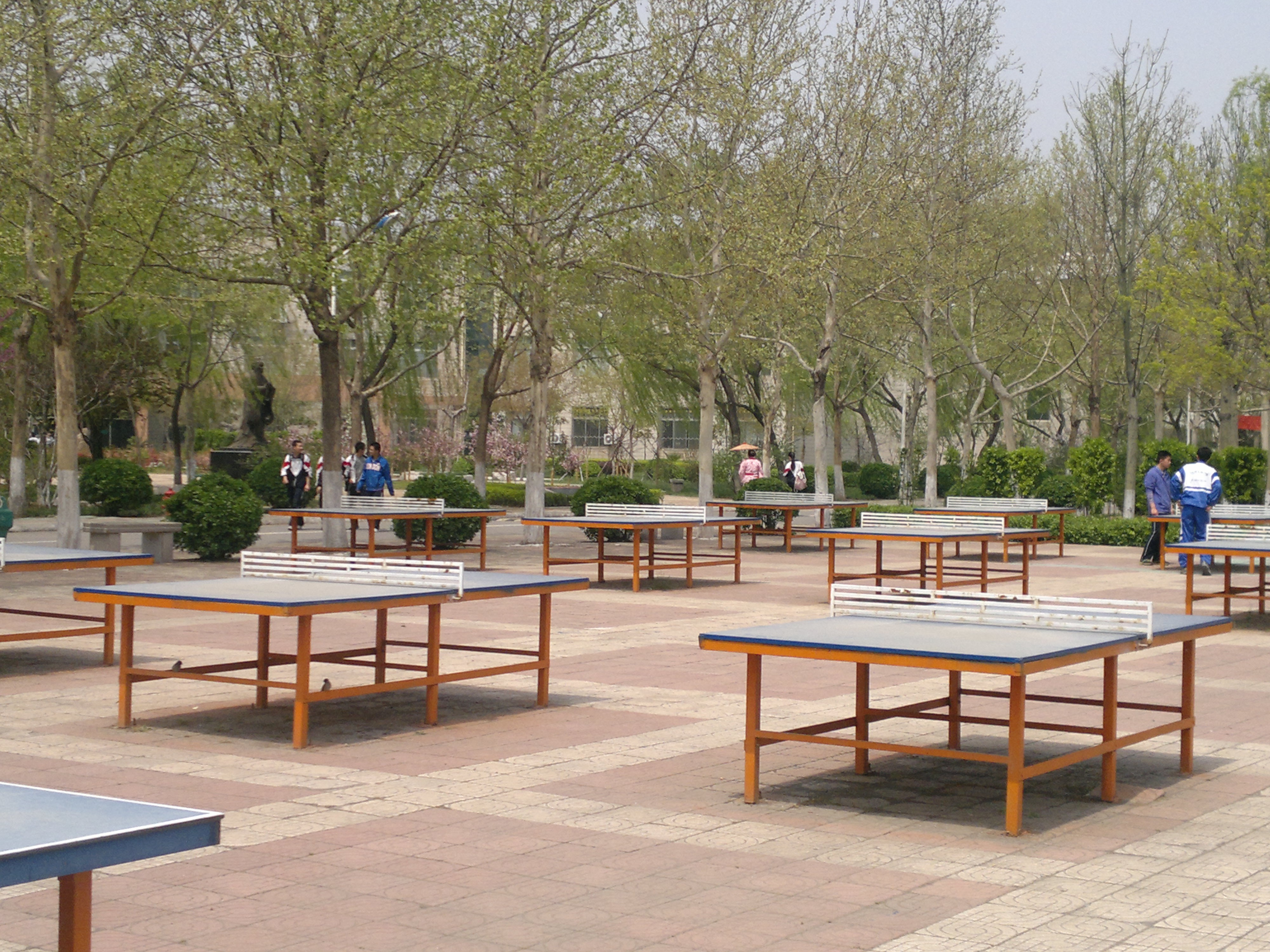 学校的乒乓球场，在后方可见孔子像，即儒园所在的位置